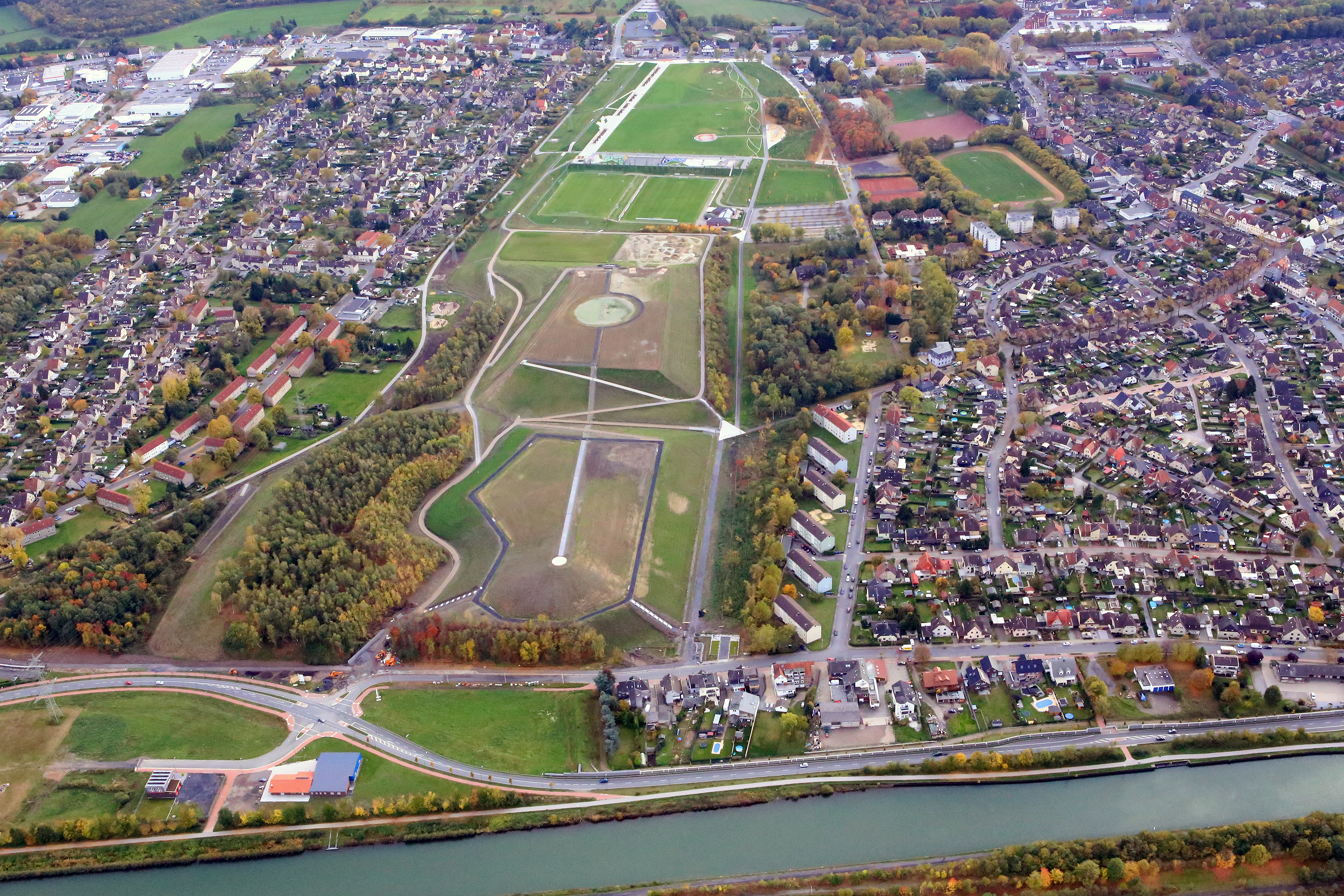 Luftbild Lippepark Hamm Herringen 2013